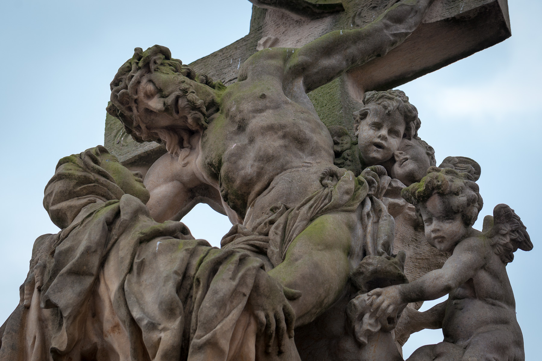 Prague